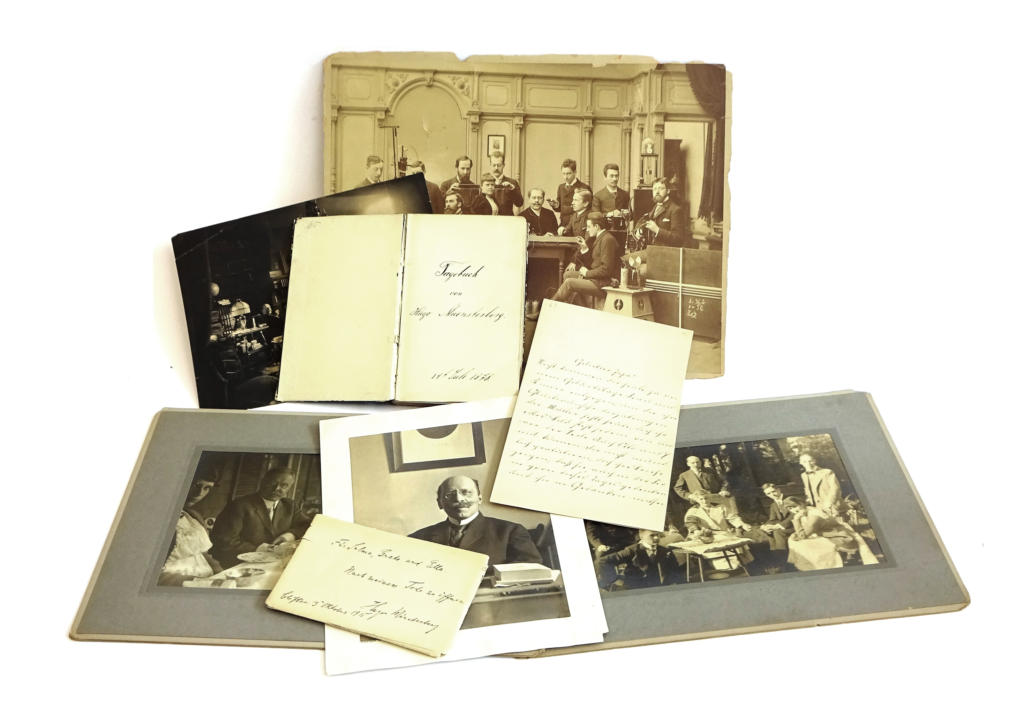 Ein Arrangement aus Fotos und Briefen aus dem Nachlass von Hugo Münsterberg des Psychologiegeschichtlichen Forschungsarchiv (PGFA) in Hagen.